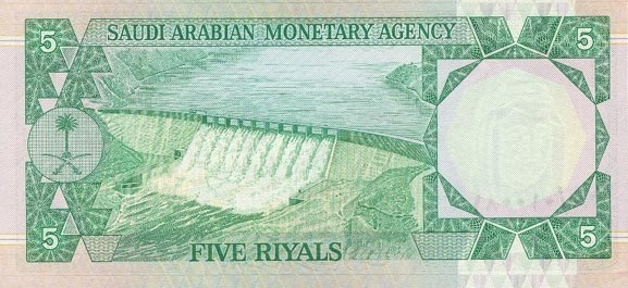 5 риалов. Саудовская Аравия, обр. 1977. Реверс.